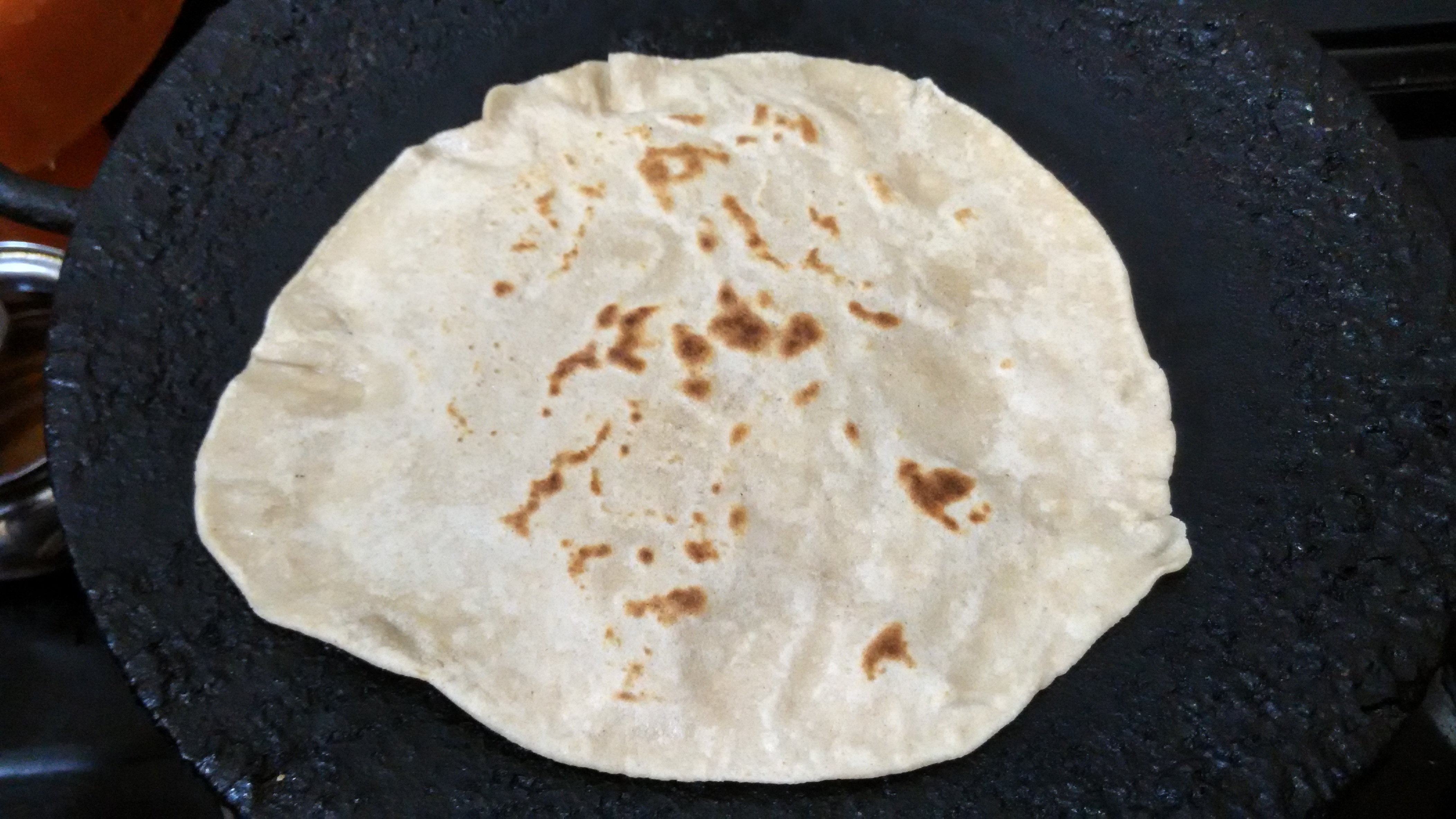 சப்பாத்தி (Chapati) என்பது கோதுமை உணவாகும்.